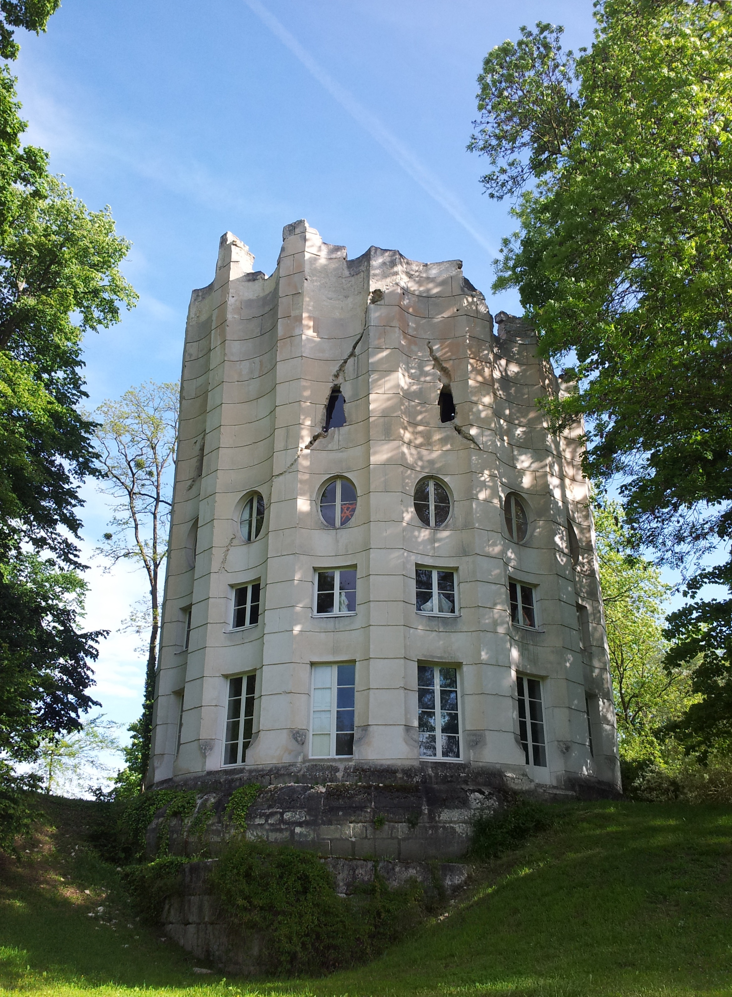 La fabrique la plus célèbre du Désert de Retz à Chambourcy en France